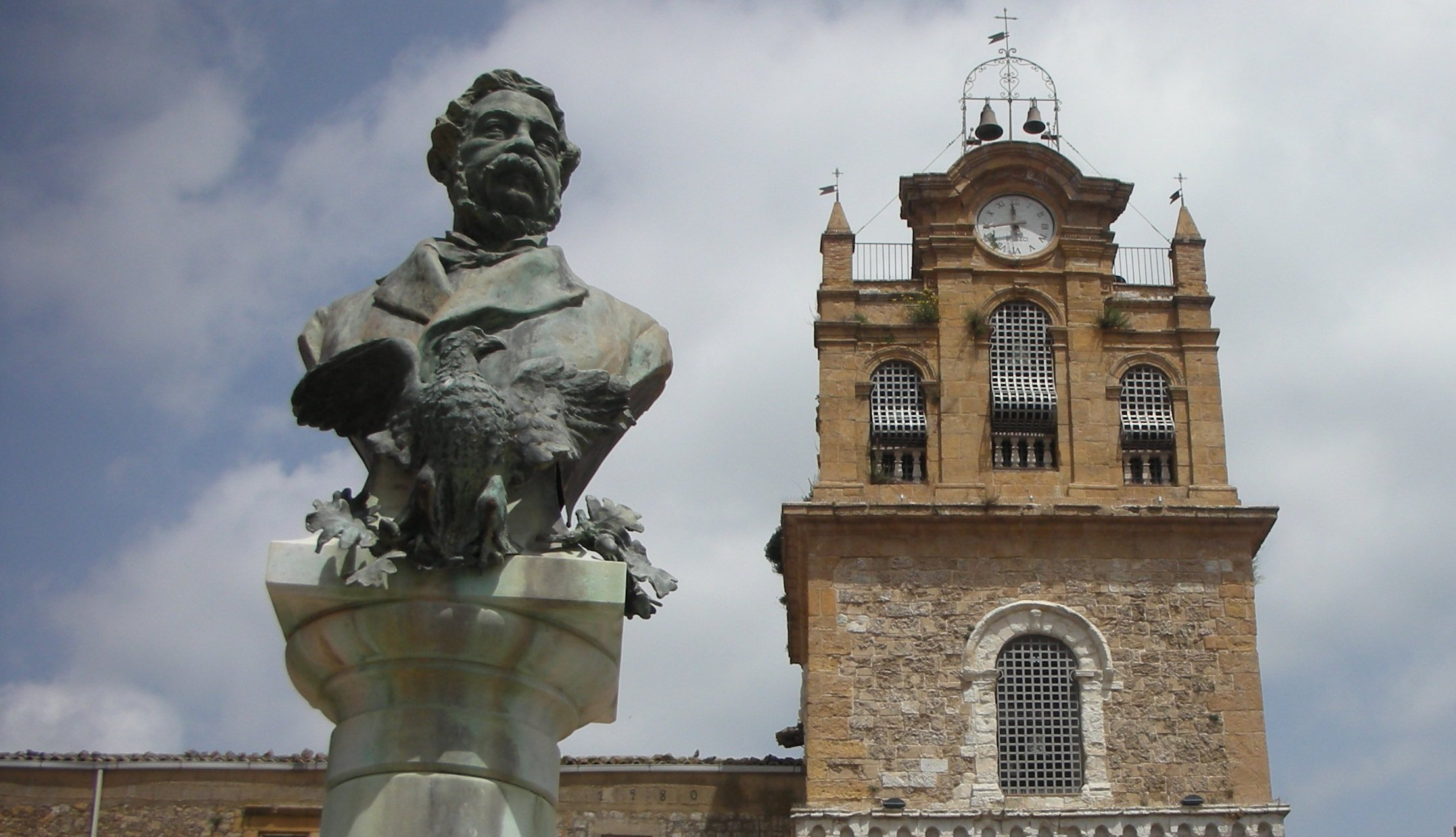 Piazza Filippo Cordova: busto di Filippo Cordova. Nato in Aidone il 4 maggio 1811 partecipò al Risorgimento al fianco di Cavour e fu Ministro per tre volte nei primi governi del Nuovo regno di Italia. Morì nel 1868